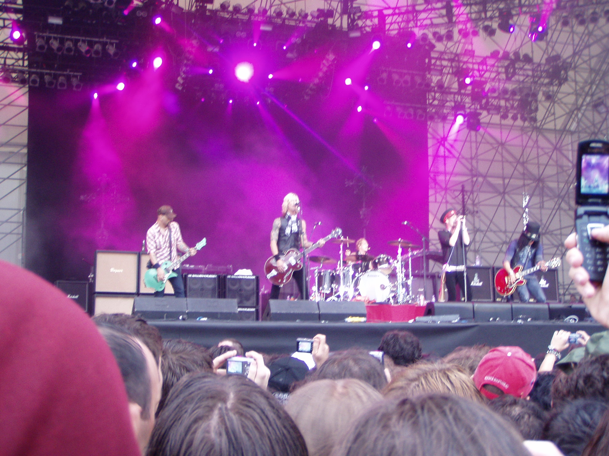 I Velvet Revolver al Gods of Metal 2007